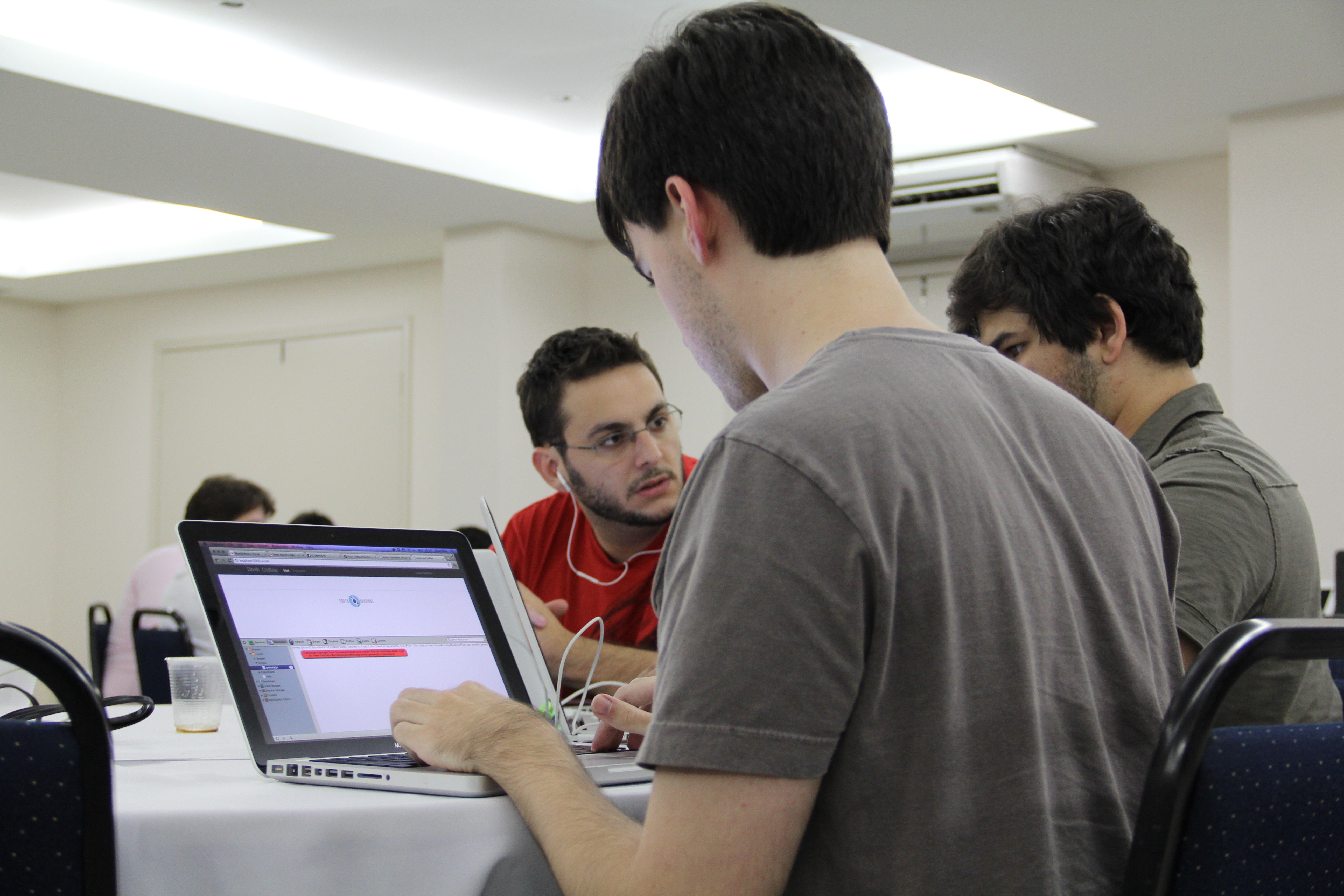 Startup Weekend é um evento intensivo de trabalho em equipe e destaca-se por reunir webdesigners, programadores, profissionais de marketing e de gestão para criarem novas startup em apenas 54 horas. O "Startup Weekend Recife" aconteceu nos dias 21, 22 e 23 de outubro, no Best Western Manibu Recife Hotel, na Avenida Conselheiro Aguiar, 919, Boa Viagem, Recife, Pernambuco, Brasil.